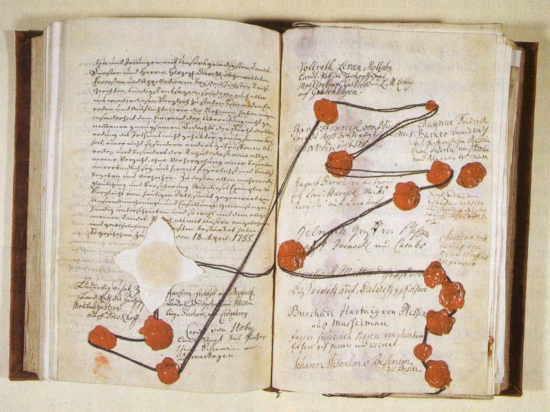 Urkunde Landesgrundgesetzlicher Erbvergleich aus dem Jahr 1755. Pergament in rotem Samteinband mit Goldborte und aufgedruckten Lacksiegel.